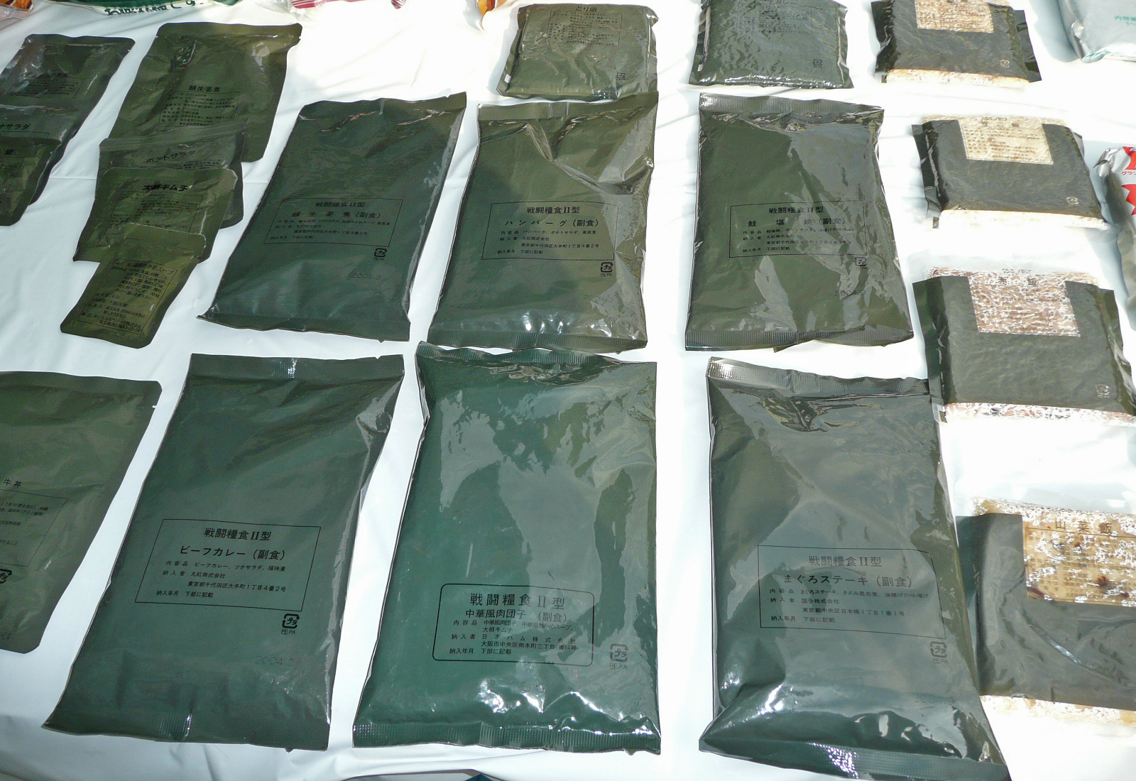 様々な戦闘糧食 II型 通称「パックメシ」